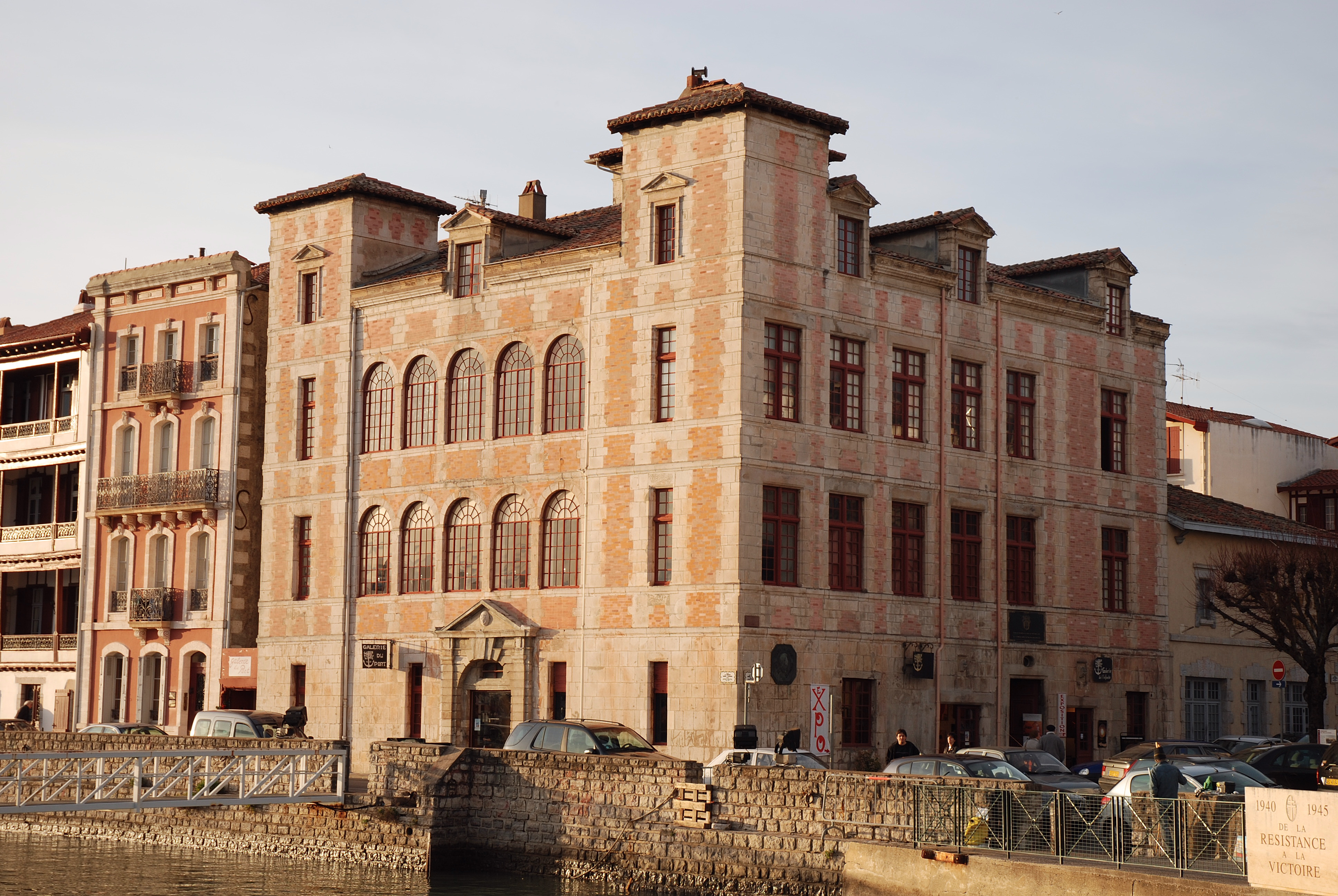 Saint-Jean-de-Luz, la maison de l'infante. Photo prise le 03/01/07 par Harrieta171